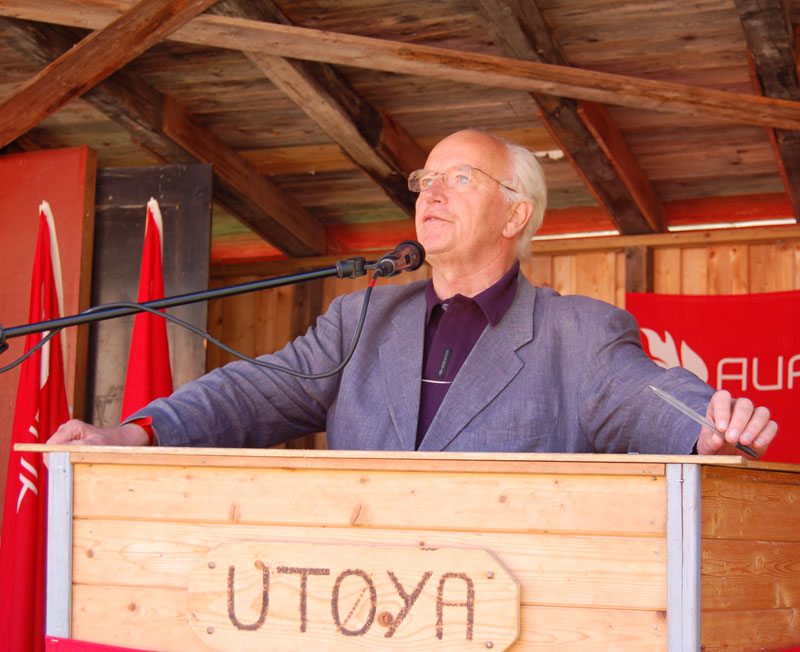 Thorvald Stoltenberg taler til unge politikere på Utøya sommeren 2006.